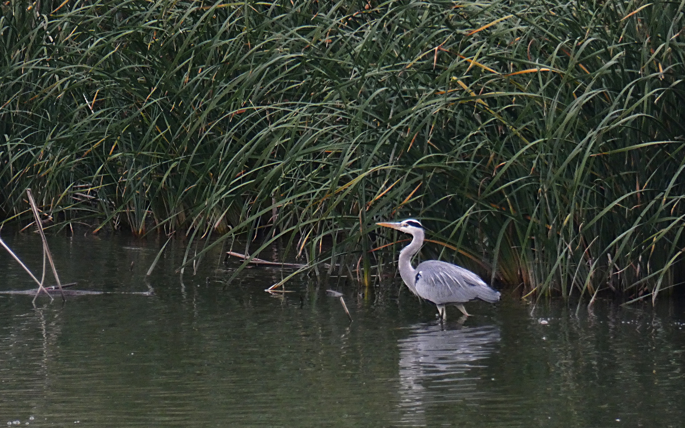 Garza real (Ardea cinerea) en el río Tajo.